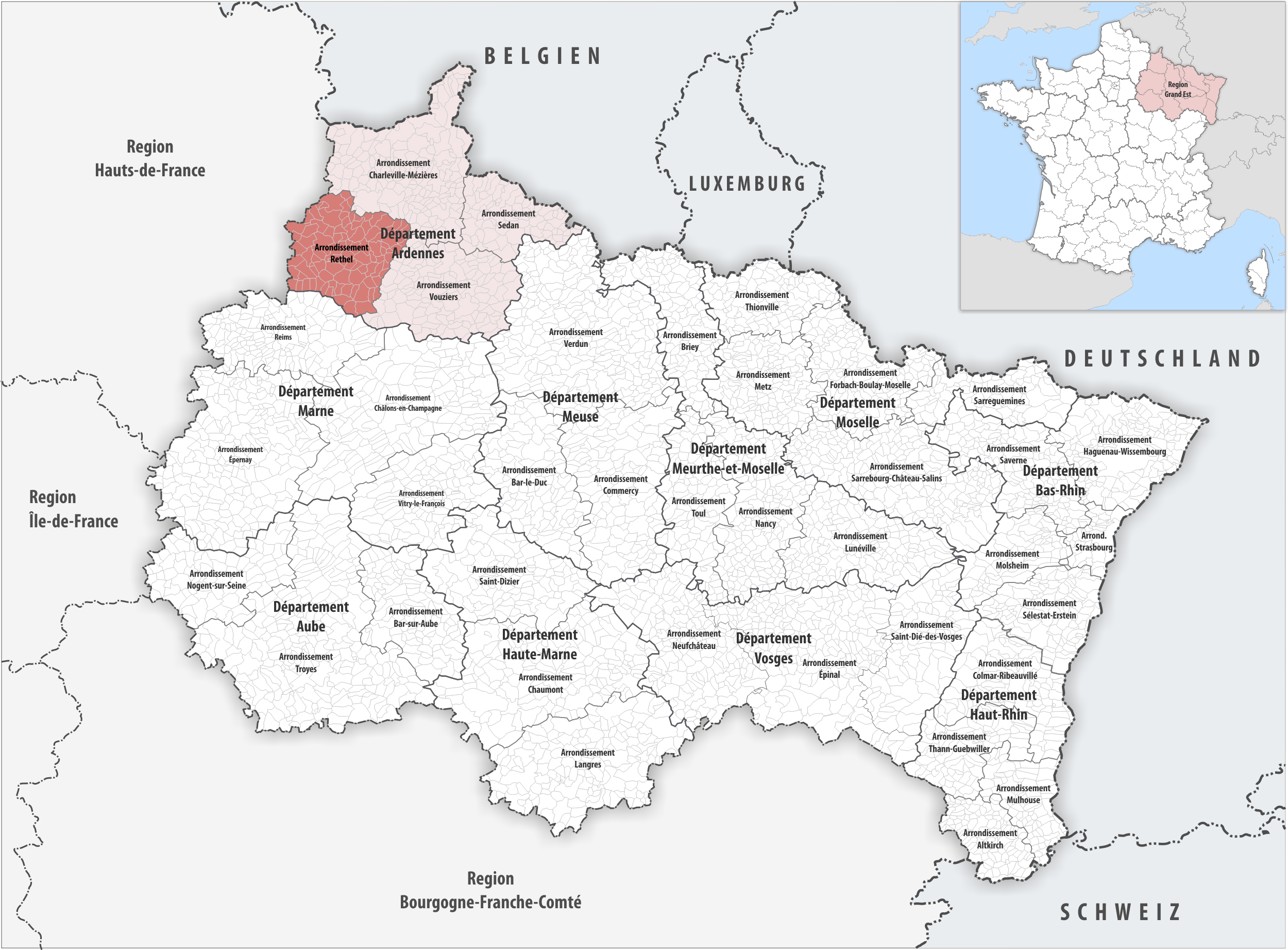 Lage des Arrondissements Rethel